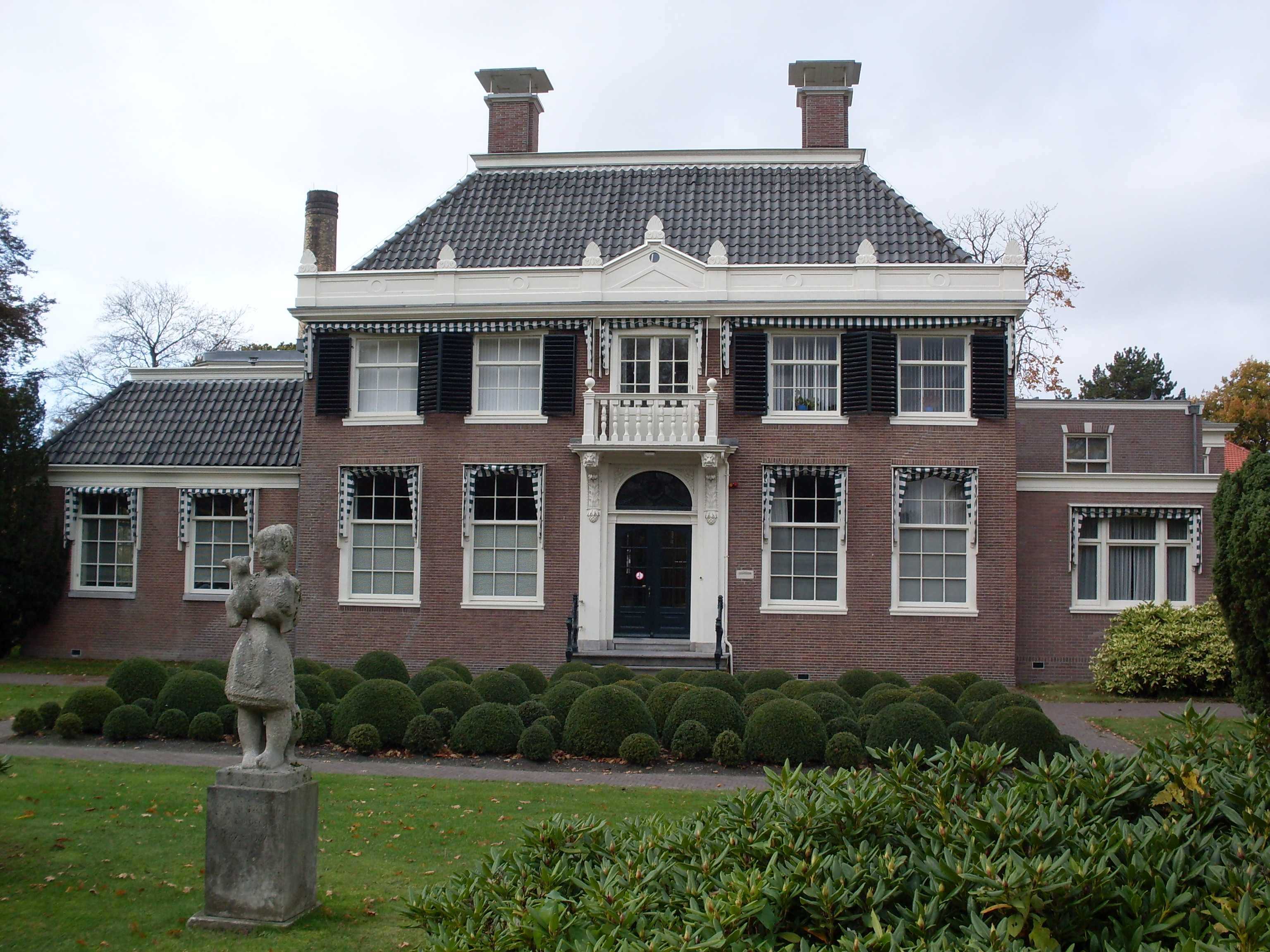 Landhuis Meer en Bosch te Heemstede